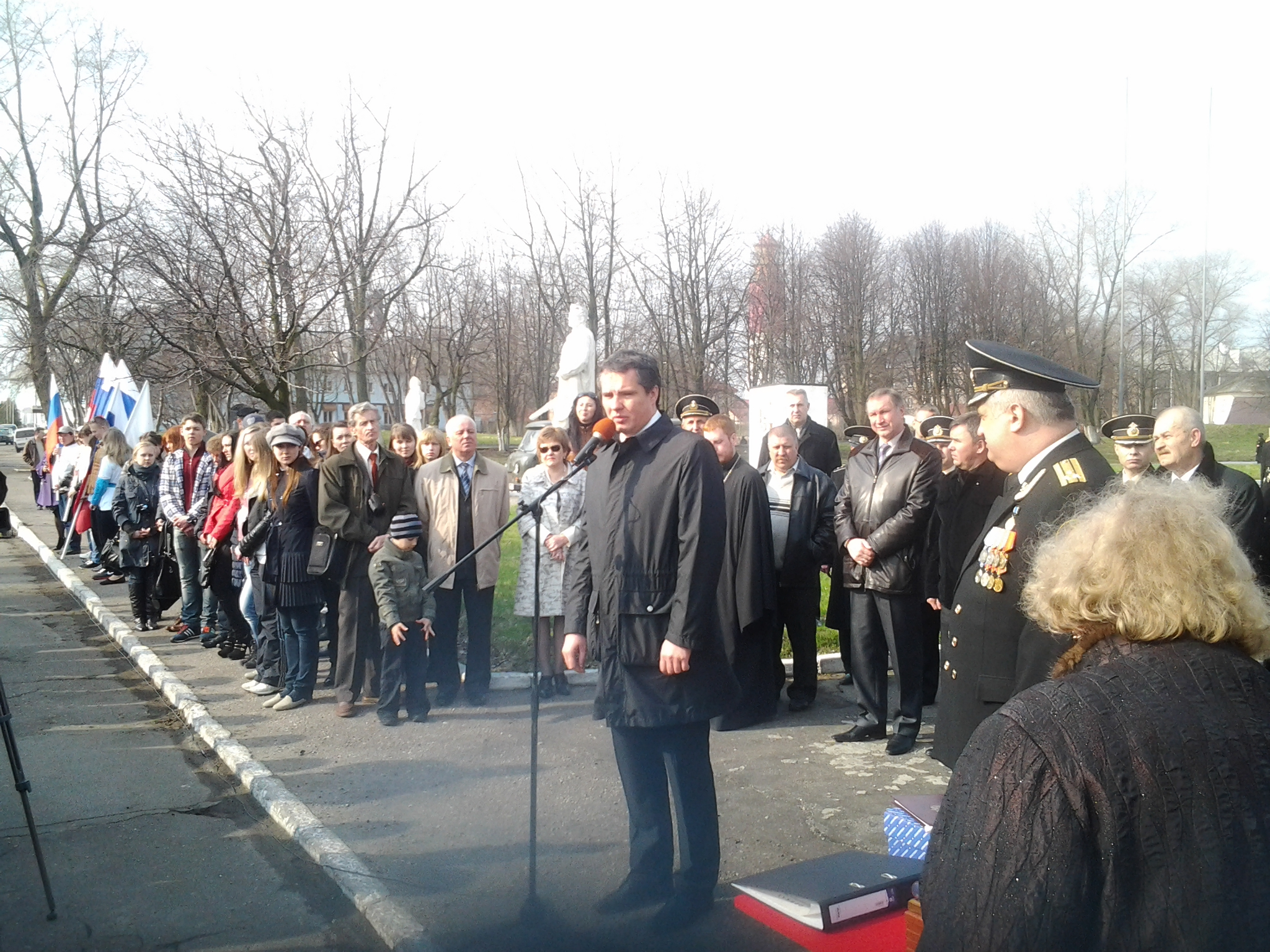 глава Администрации г. Заречного В. Гладков поздравляет с имянаречением кораблей